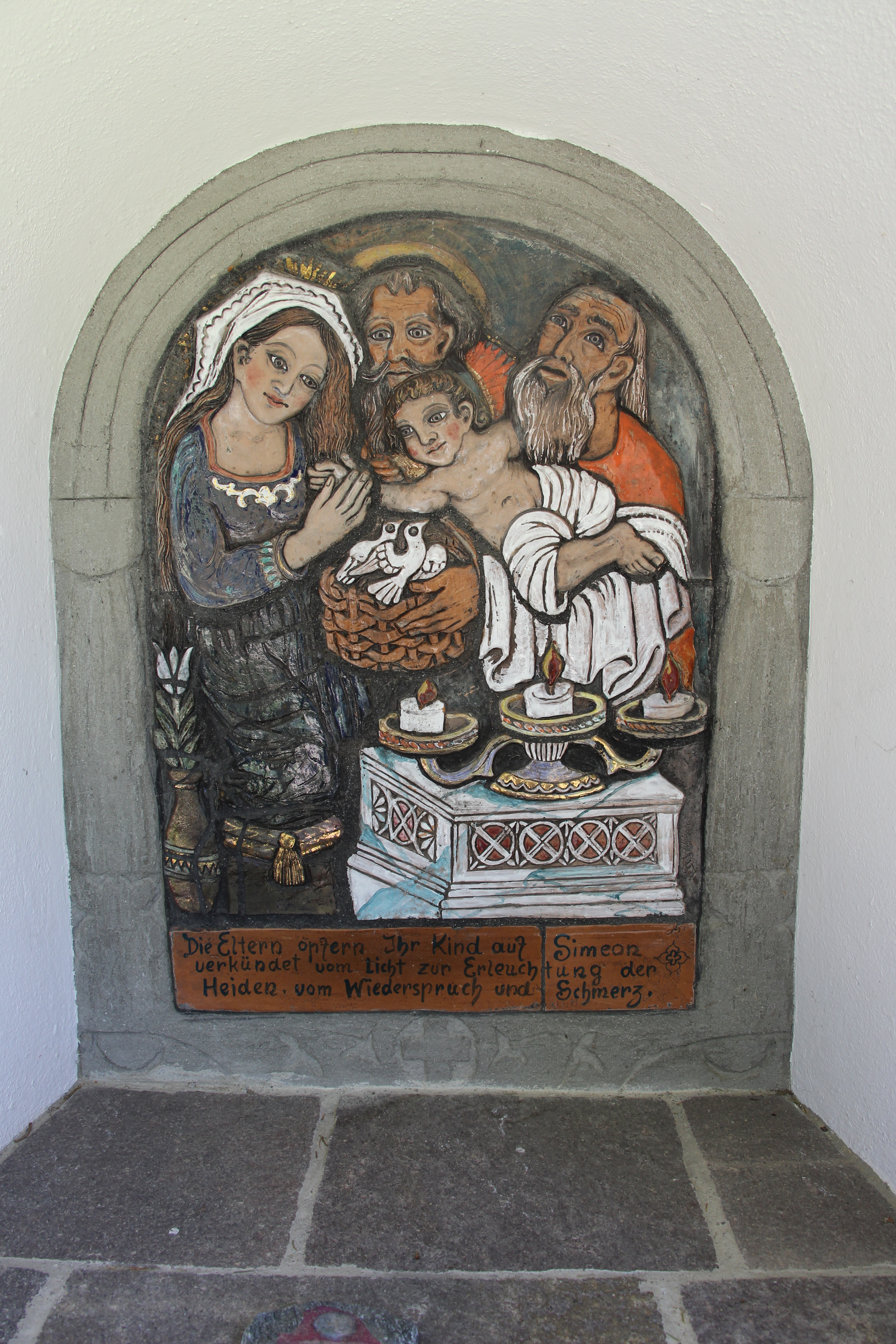 Kalvarienberg/Kreuzweg, 5 Nischenbildstöcke This media shows the remarkable cultural object in the Austrian state of Tyrol listed by the Tyrolean Art Cadastre with the ID 36653. (on tirisMaps, pdf, more images on Commons, Wikidata)